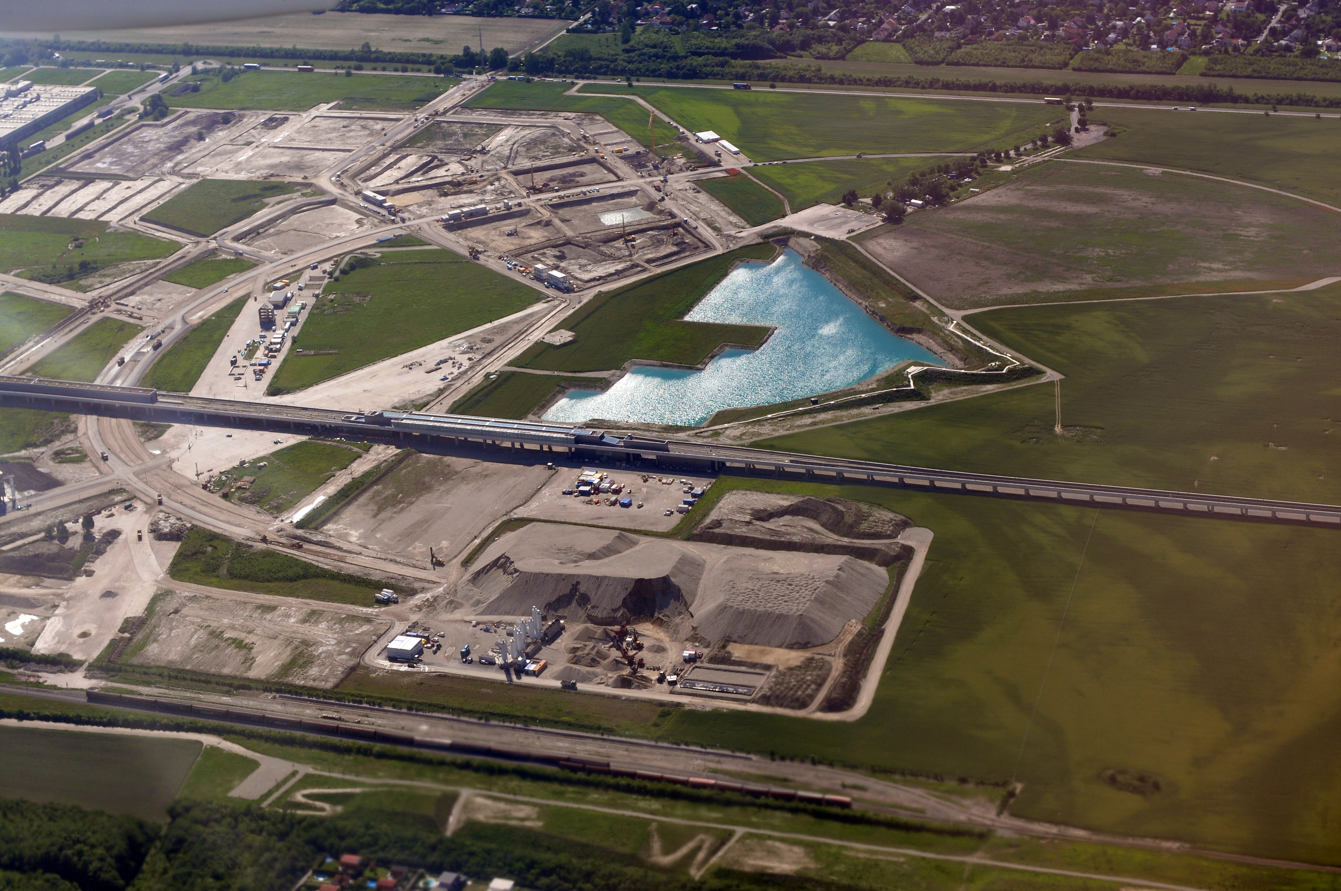 Landeanflug Wien-Schwechat